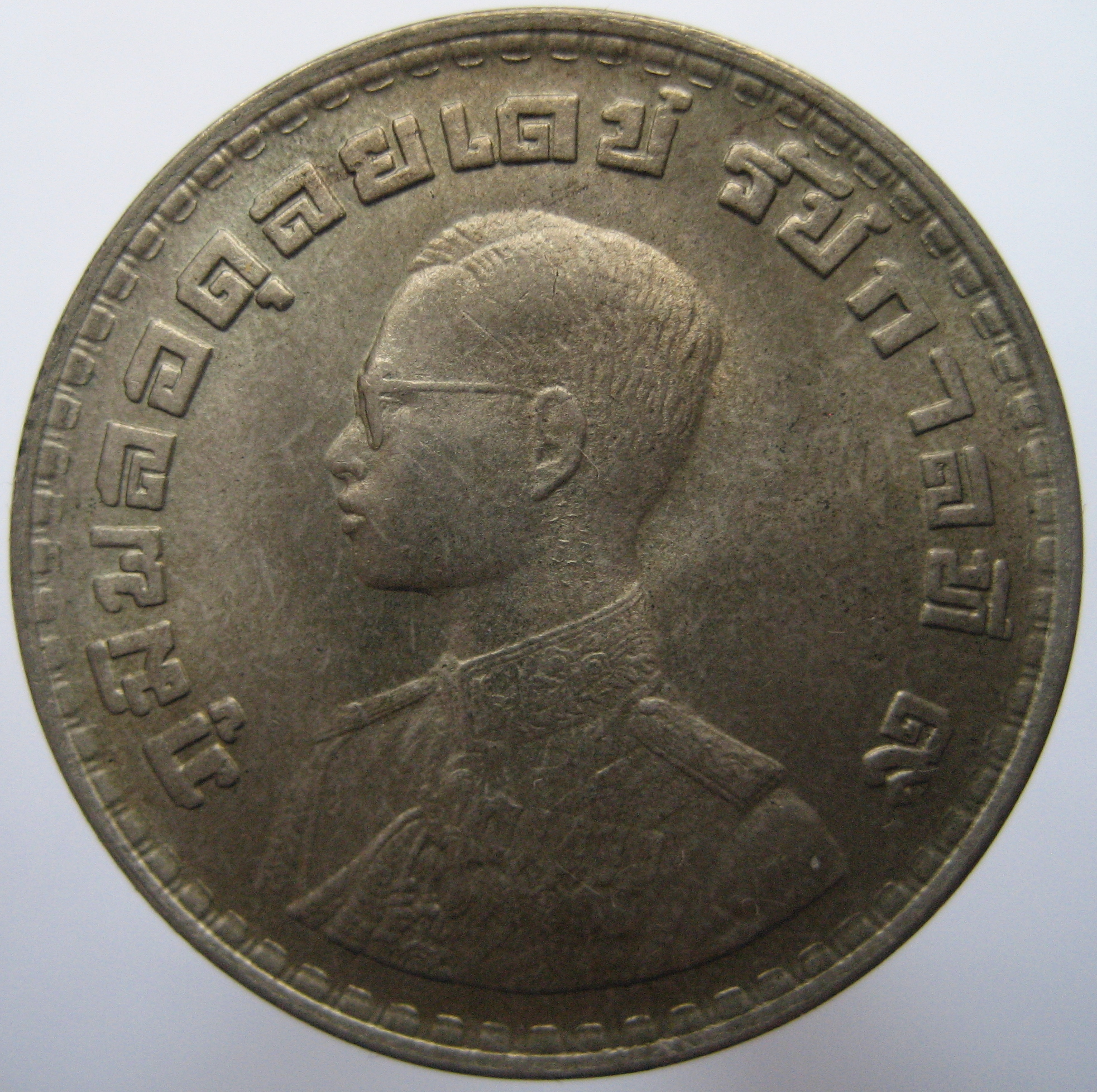 1 бат 1962 года, Таиланд, аверс.